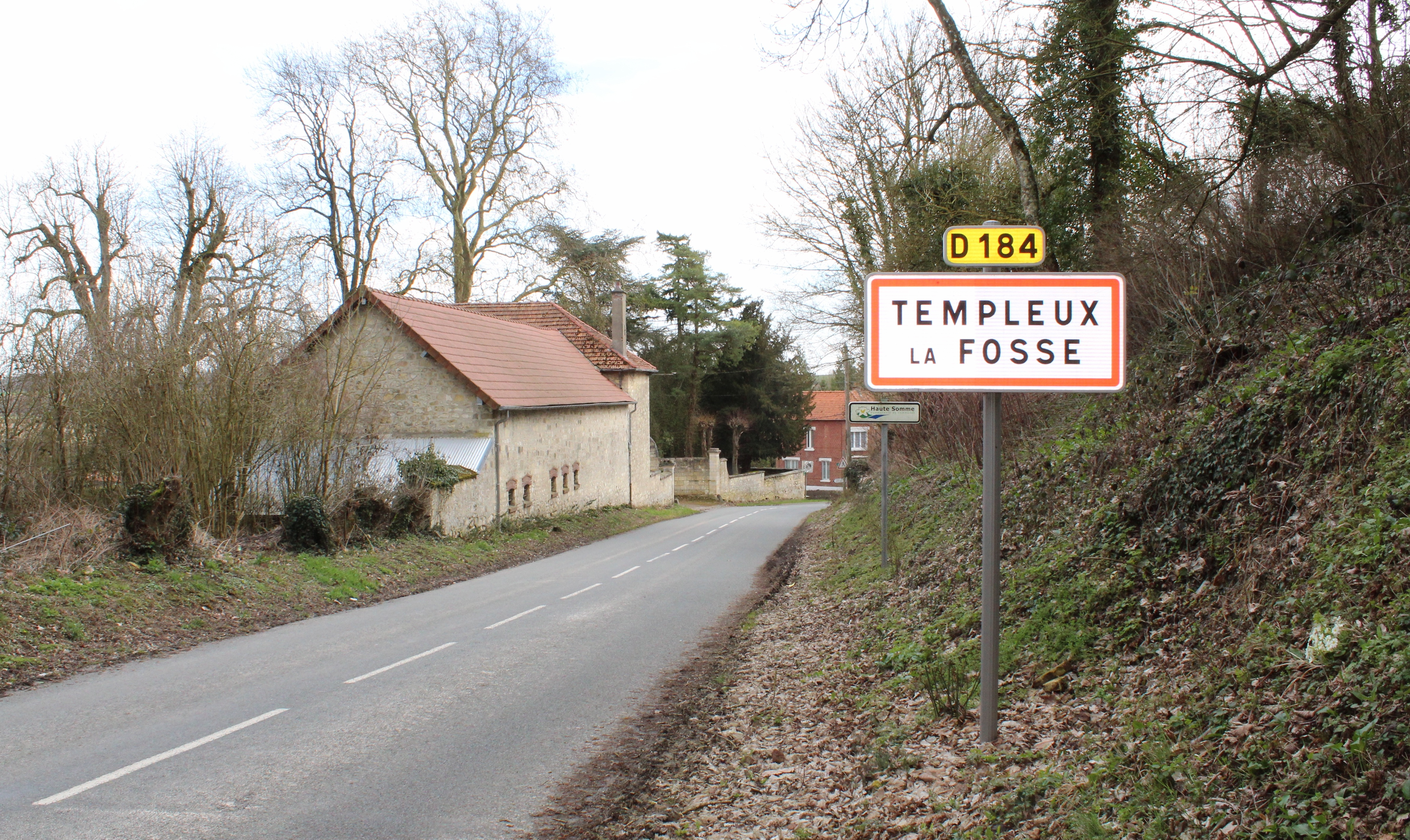 Entrée du village.